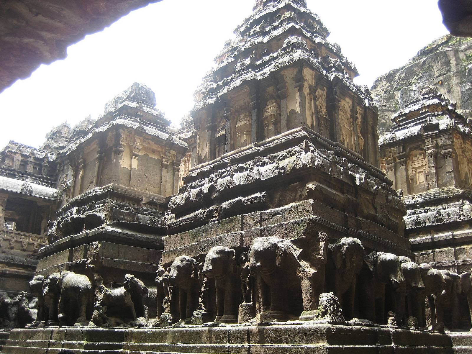 لابىاتيبلا